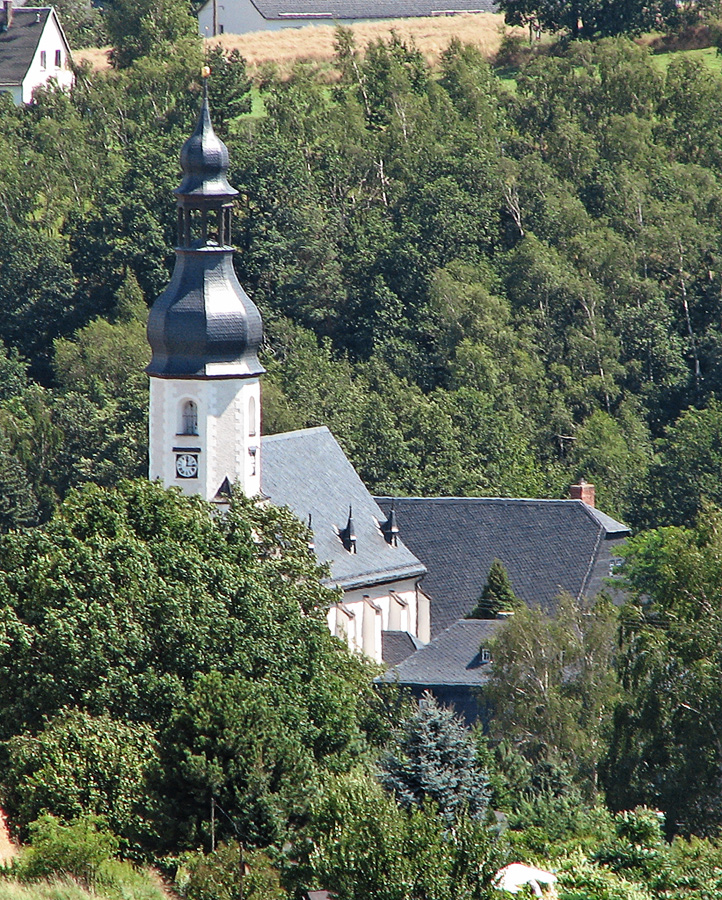 Beschreibung: Salvatorkirche im Ortsteil Weißbach von Langenweißbach im Erzgebirge Fotograf: Darkone, 31. Juli 2005